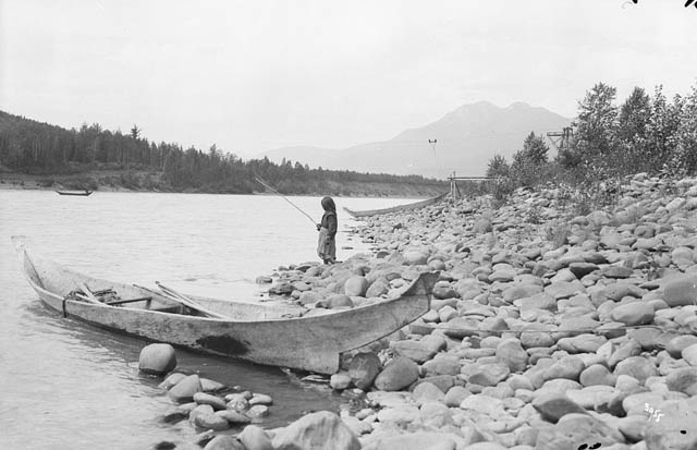 Indian girl fishing, Skeena River, at Kitwanga, B.C